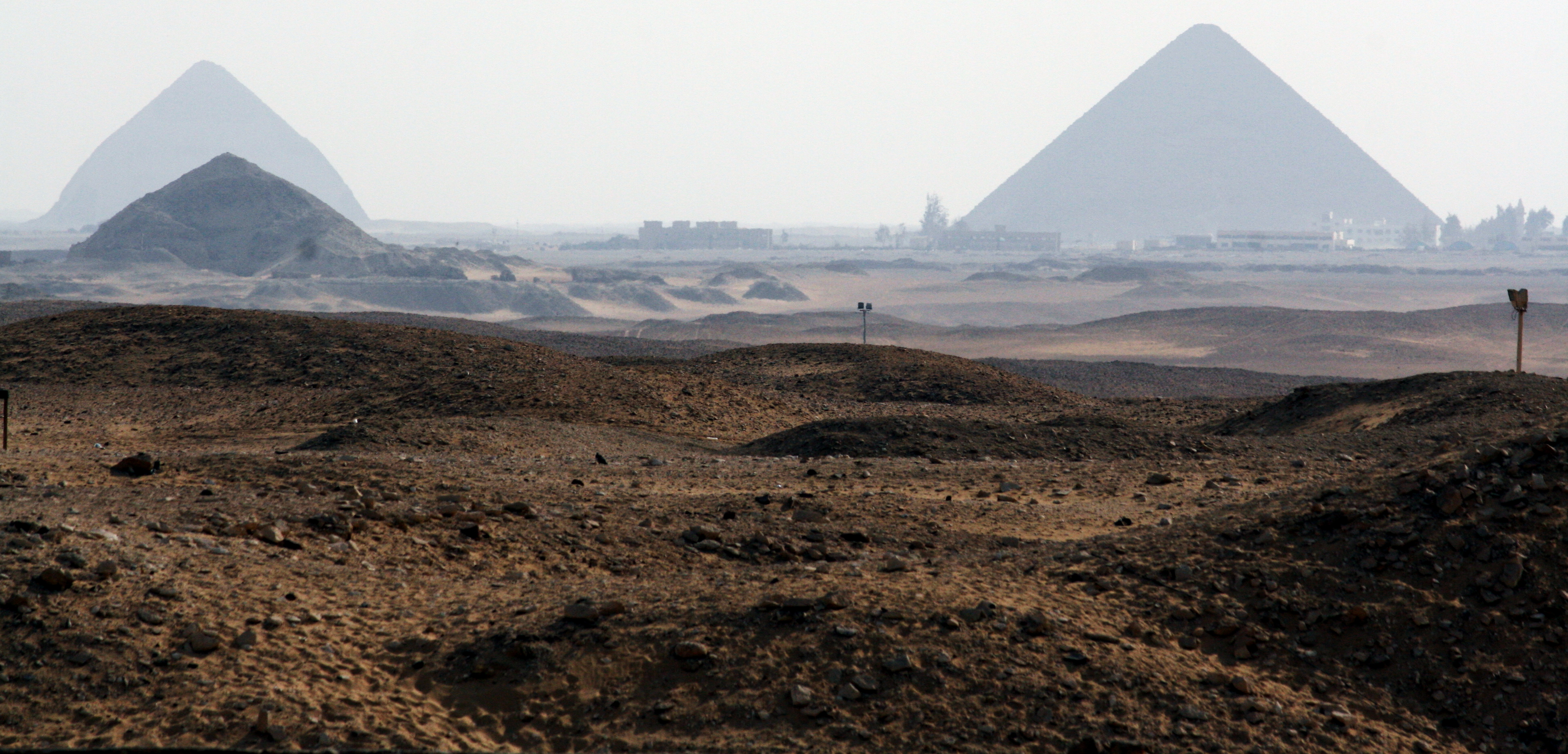 Blick vom Süd-Ende des Pyramidenkomplexes von Djoser in Richtung Süd (Dashschur)Links Vordergrund: Pepi-II.-Pyramide (Sakkara-Süd)Links Hintergrund: Knickpyramide (Dahschur)Rechts Hintergrund: Rote-Pyramide (Dahschur)